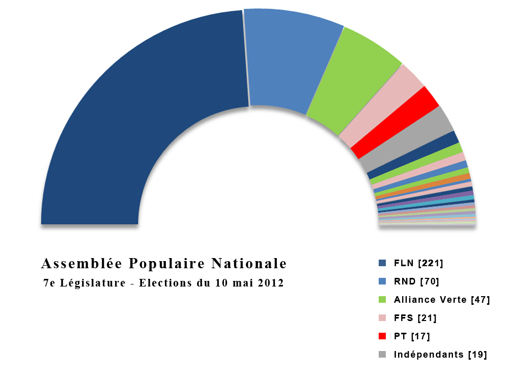 Composition de l'Assemblée Populaire Nationale de la 7e législature 20012-2017